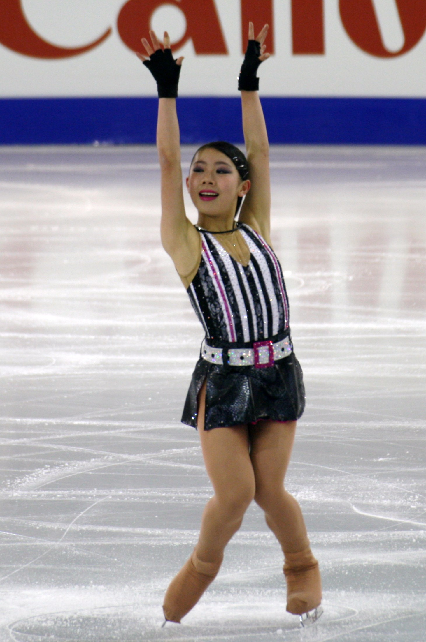 Мию Накасио (Япония) на на финале Гран-при среди юниоров 2014-2015. Короткая программа.